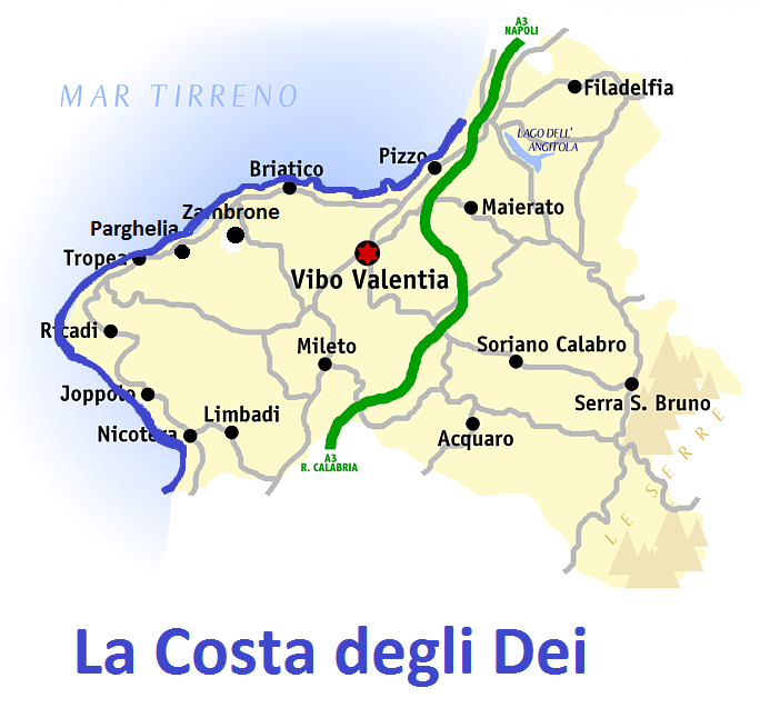 La "Costa degli Dei" in provincia di Vibo Valentia,Calabria.